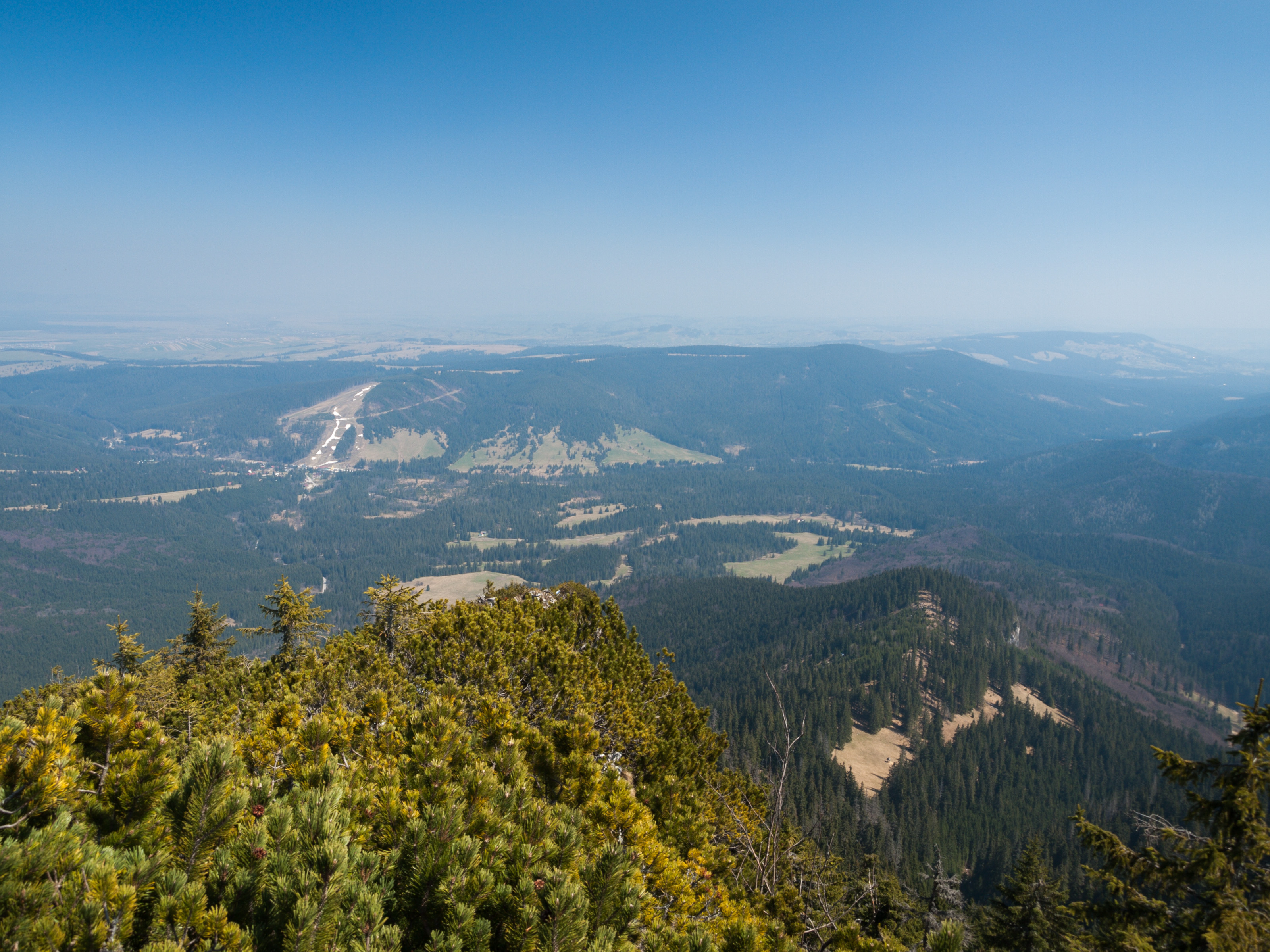 Mihulcza Czuba (przed nią polana Siodło), w dole Rów Orawicki z Orawicami, nad nim pasmo Magury Witowskiej, w oddali po prawej Pasmo Gubałowskie